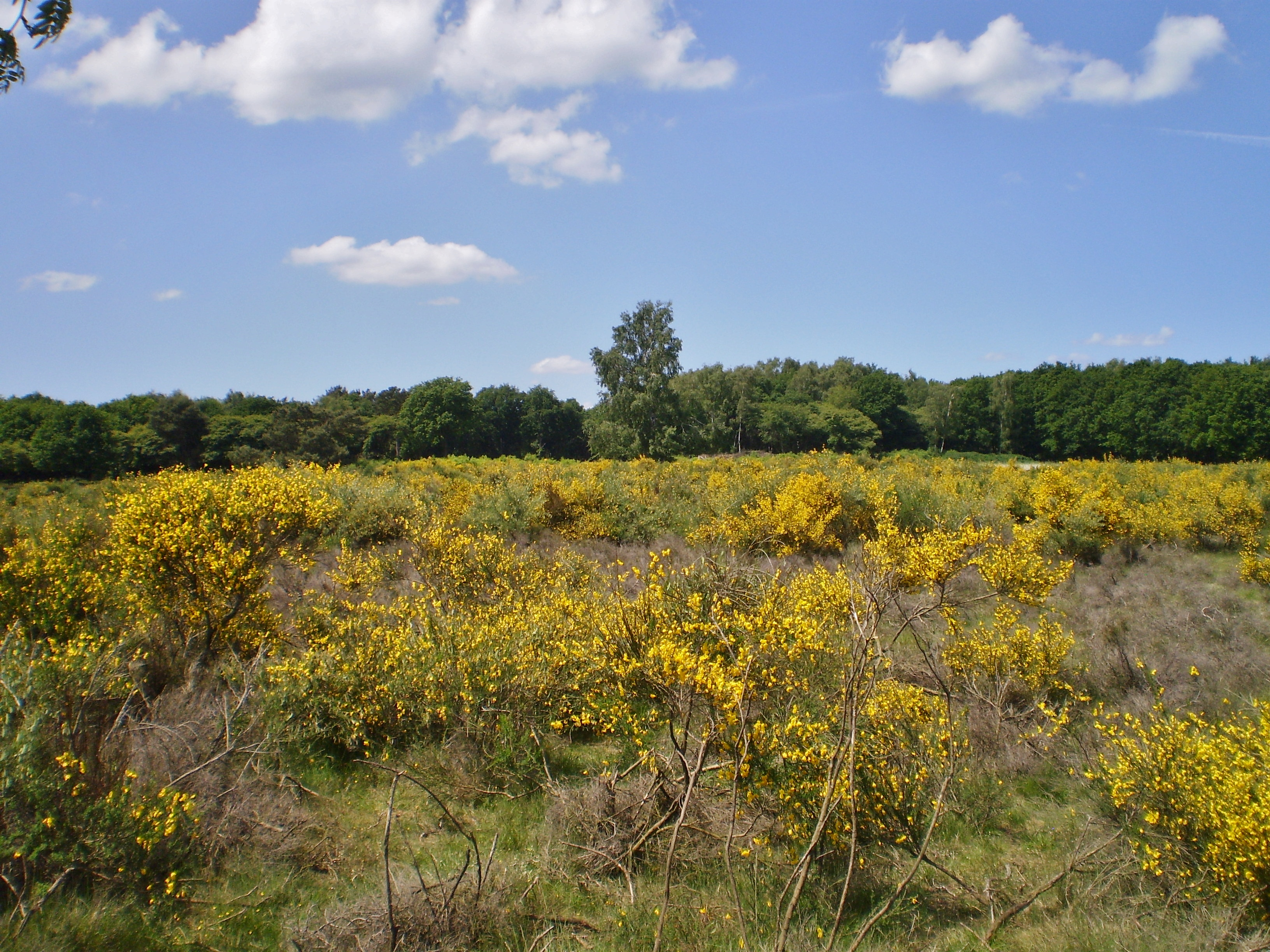 Westerheide bij Hilversum: Aardjesberg